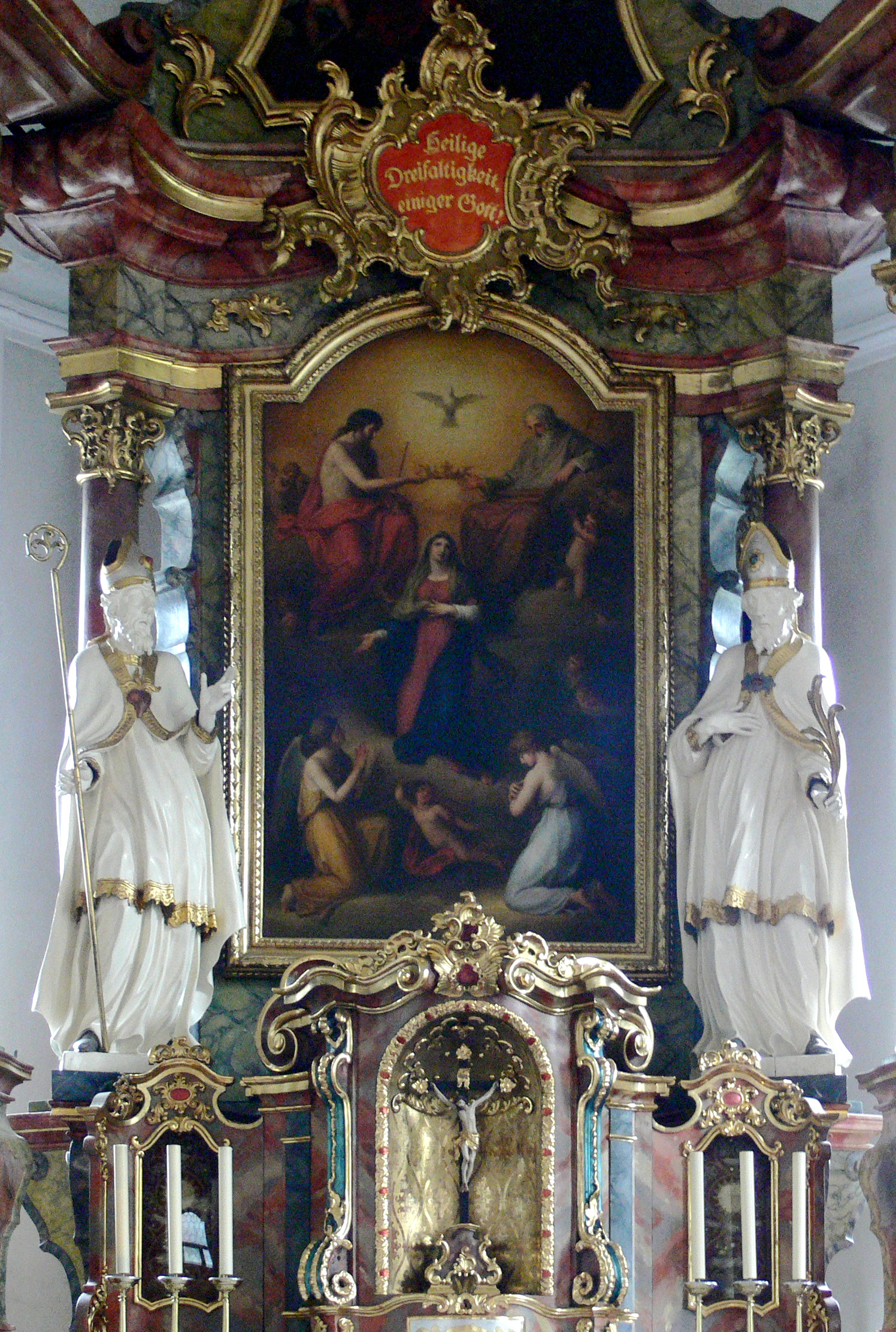 Schwarzenberg, Vorarlberg: Pfarrkirche Heiligste Dreifaltigkeit Hochaltar mit Altarblatt von Angelica Kauffmann